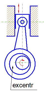 Výstředníkový_mechanizmus